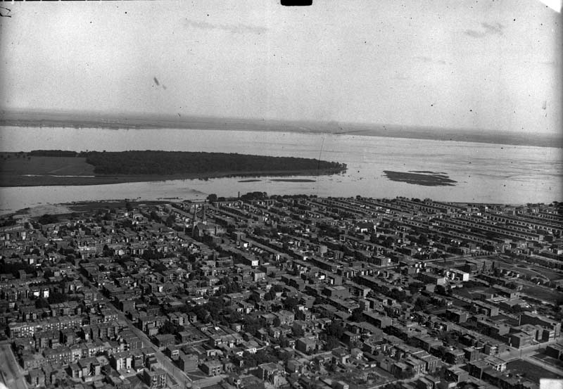 Verdun et l'Île des Soeurs en 1927